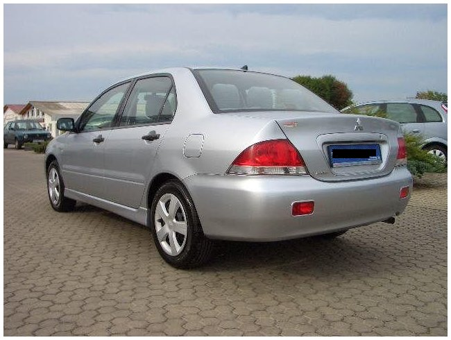 Mitsubishi Lancer Limousine 2003